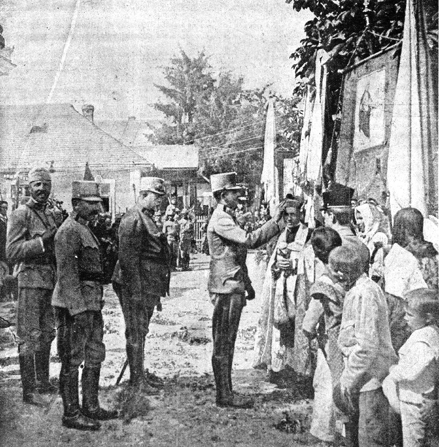 Prestolonaslednik Karel na tirolski fronti